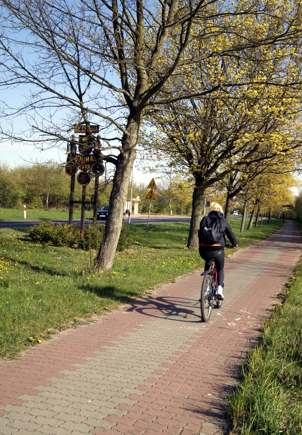 Ścieżka rowerowa Gorzów - Kłodawa